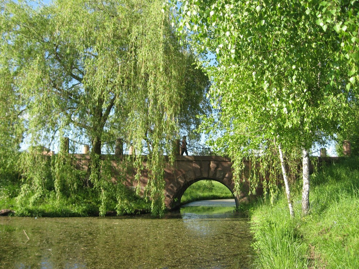 Нясвіж. Мост у парку